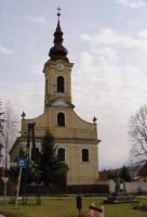 Evangélikus templom, Egyházaskozár